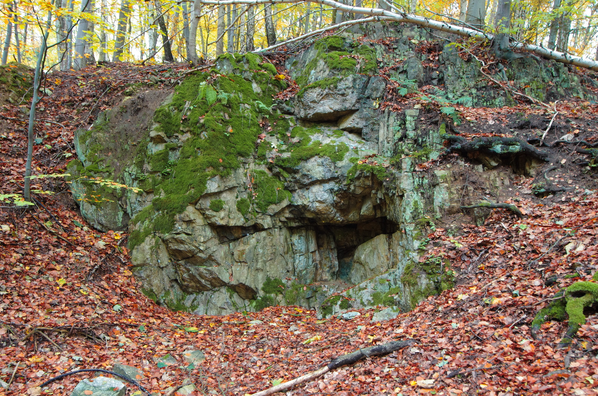 Přírodní památka - U cihelny, Hazlov u Aše, okres Cheb